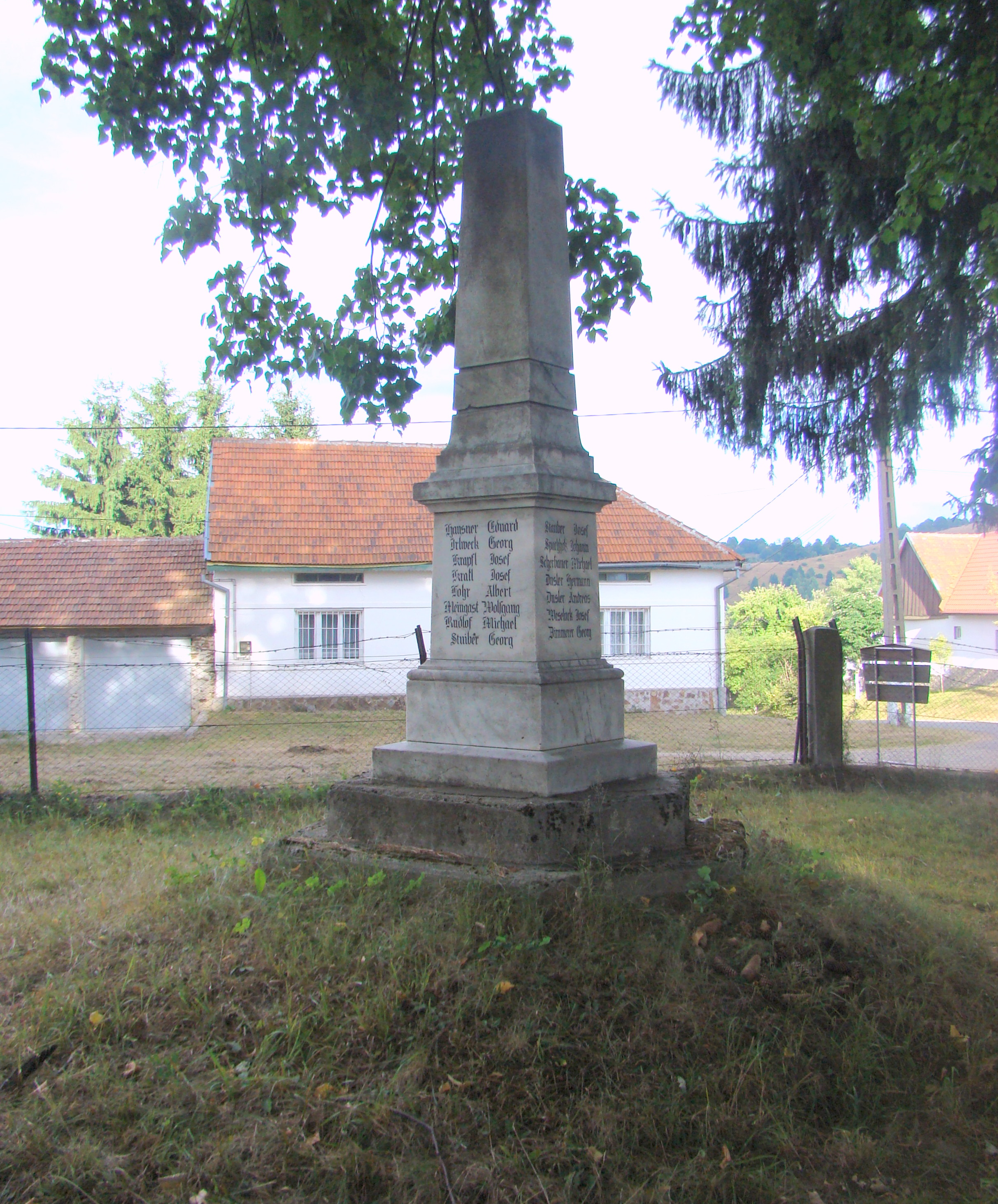 Rumantsch: Monumentul eroilor din Brebu Nou, Caraș-Severin